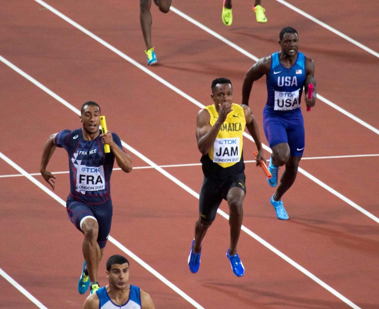 d8_76051 4x100m heren